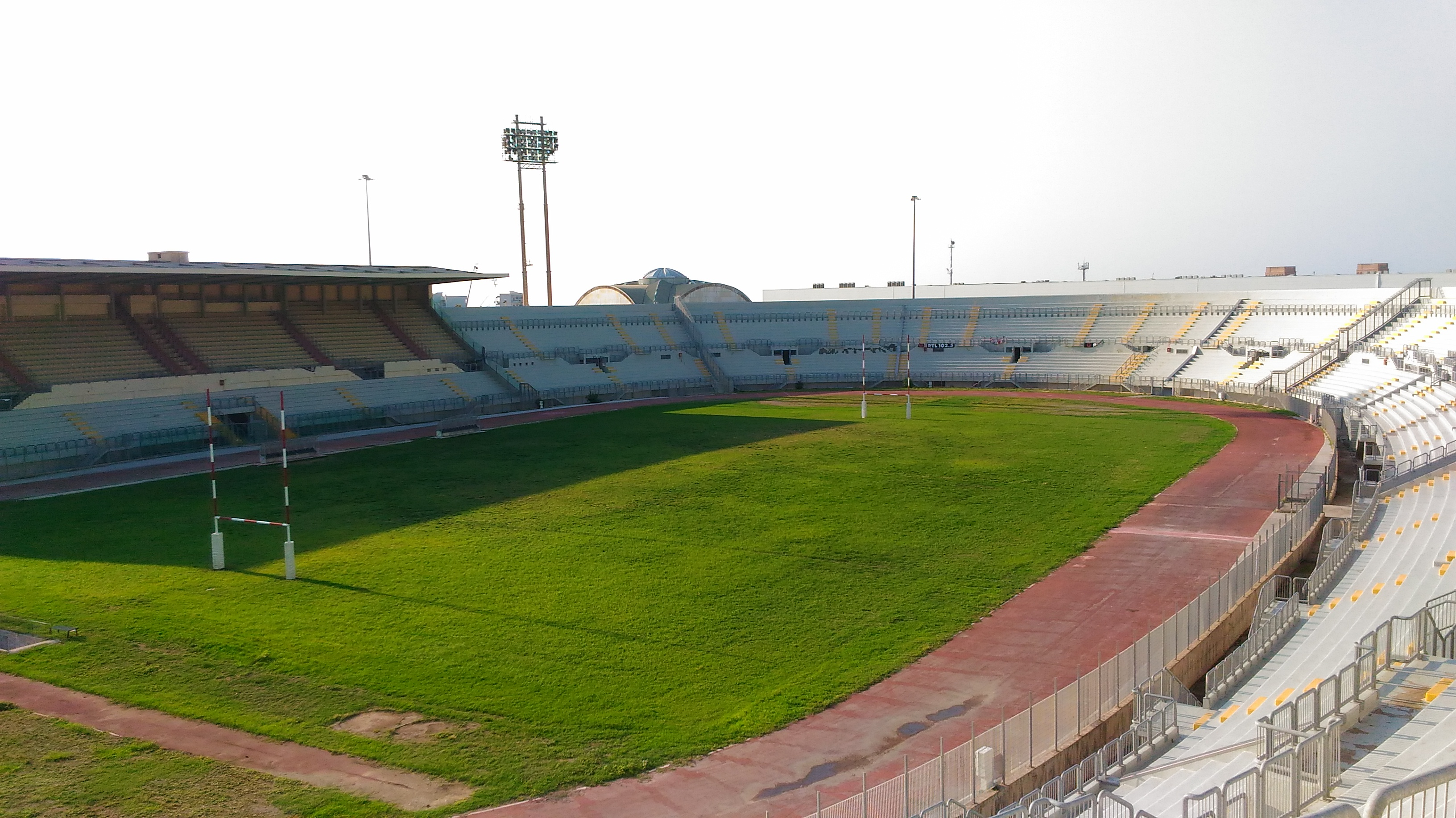 Visuale panoramica dello stadio "della Vittoria" di Bari, inquadrato dagli spalti superiori della Curva Sud.